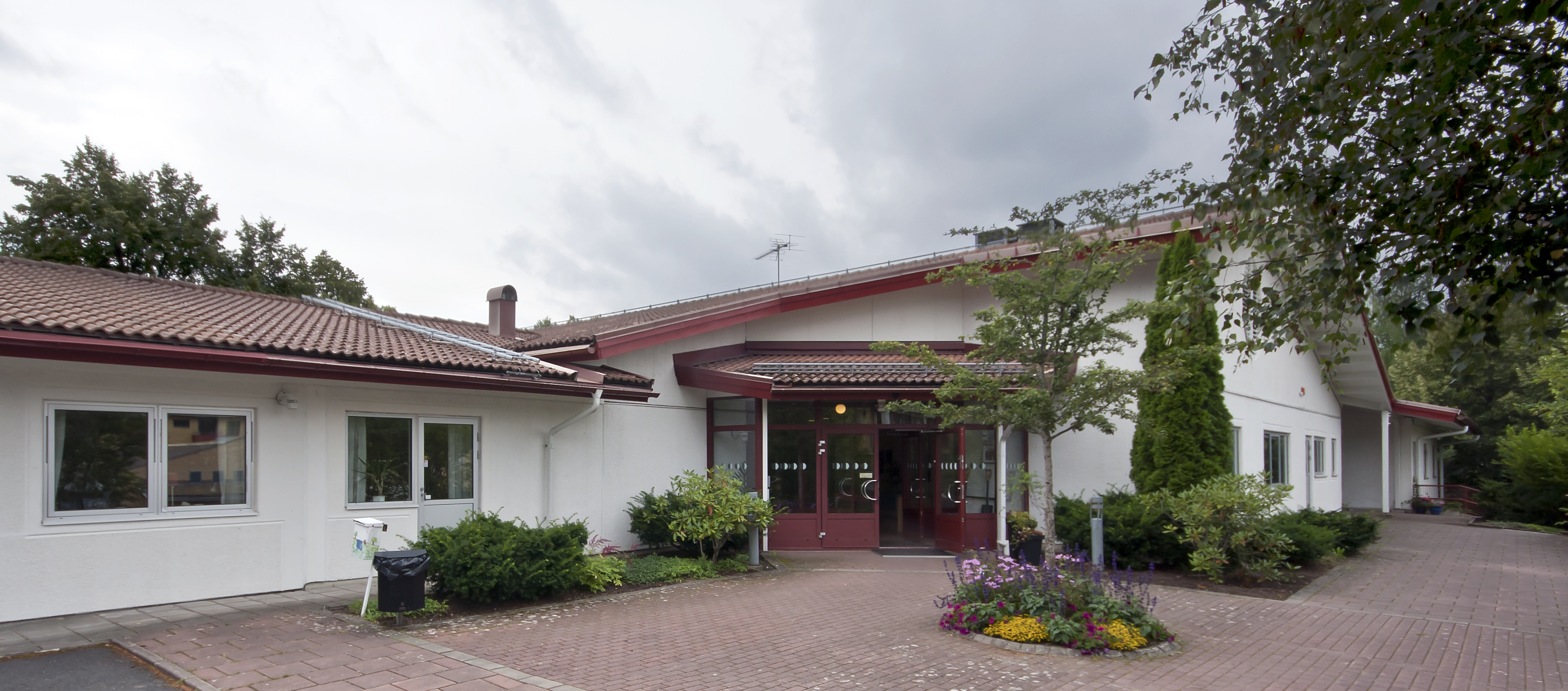 Noltorpskyrkan i Alingsås, en samarbetskyrka mellan EFS och Alingsås församling.